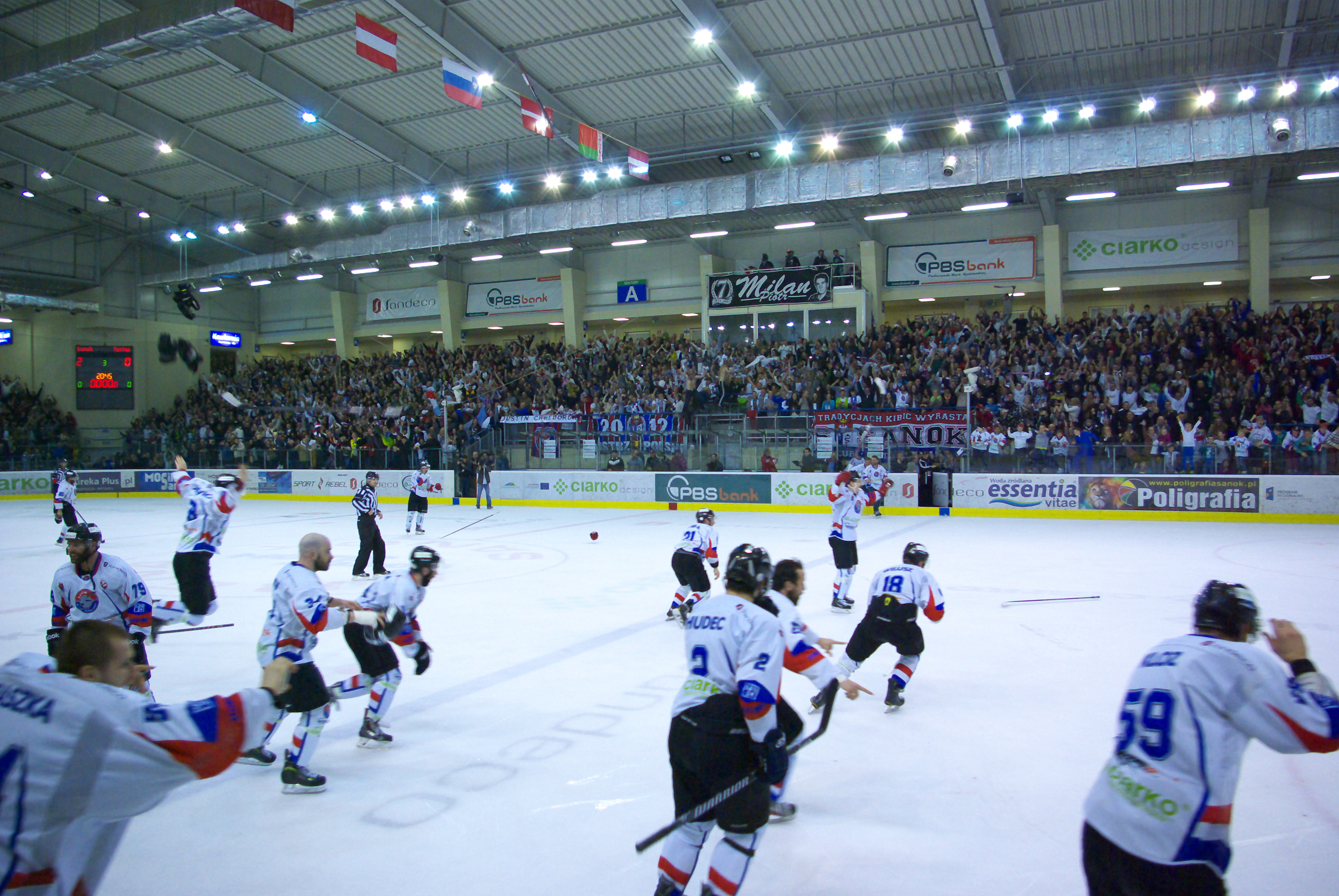 Szósty mecz finałowy o mistrzostwo Polski w hokeju na lodzie w sezonie PHL 2013/2014: Ciarko PBS Bank KH Sanok – GKS Tychy (2:0), 3 kwietnia 2014 w Sanoku (Arena Sanok). Złoty medal dla zespołu z Sanoka.